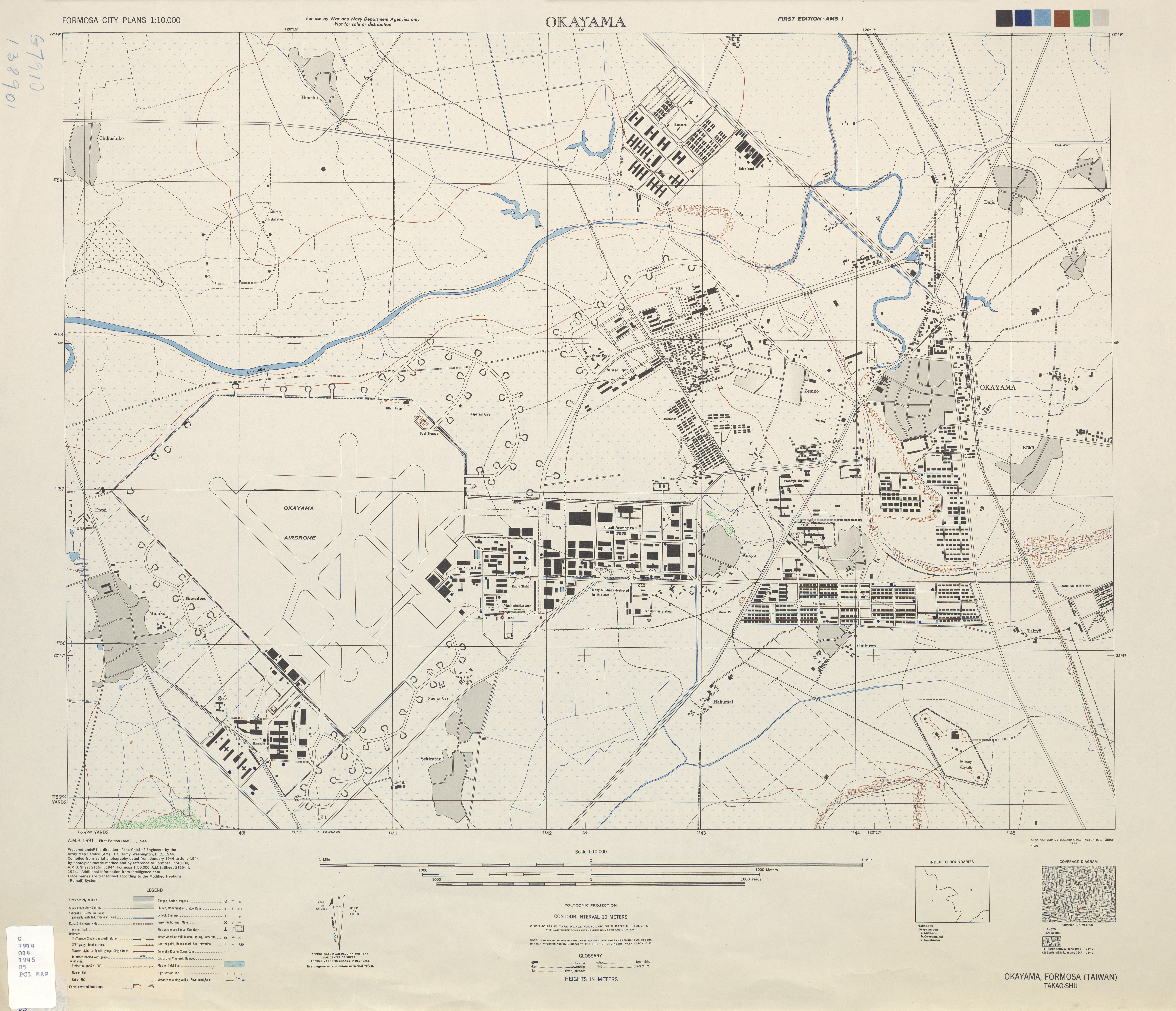 Map of Okayama